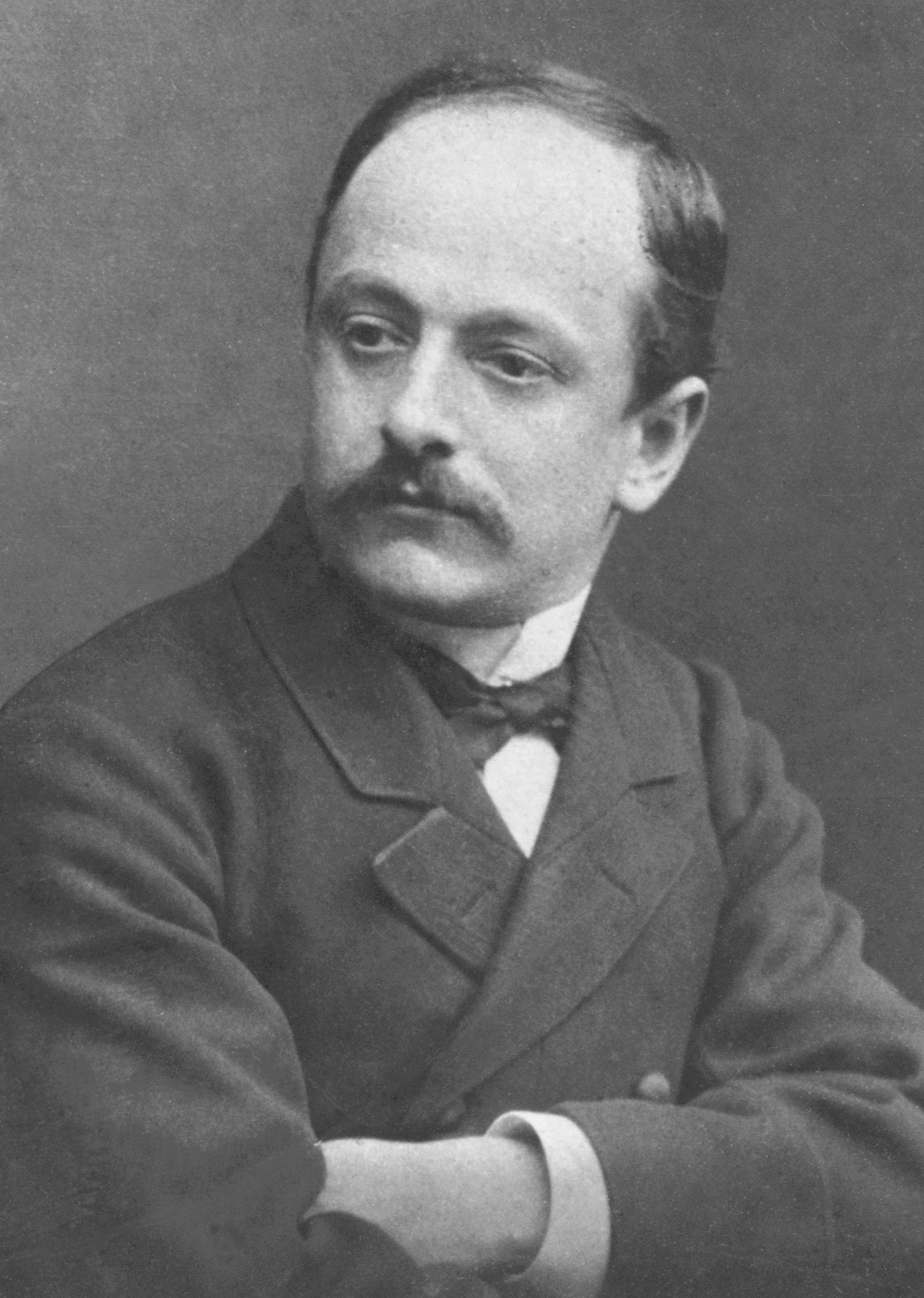 Augusto Piccini, Italian chemist